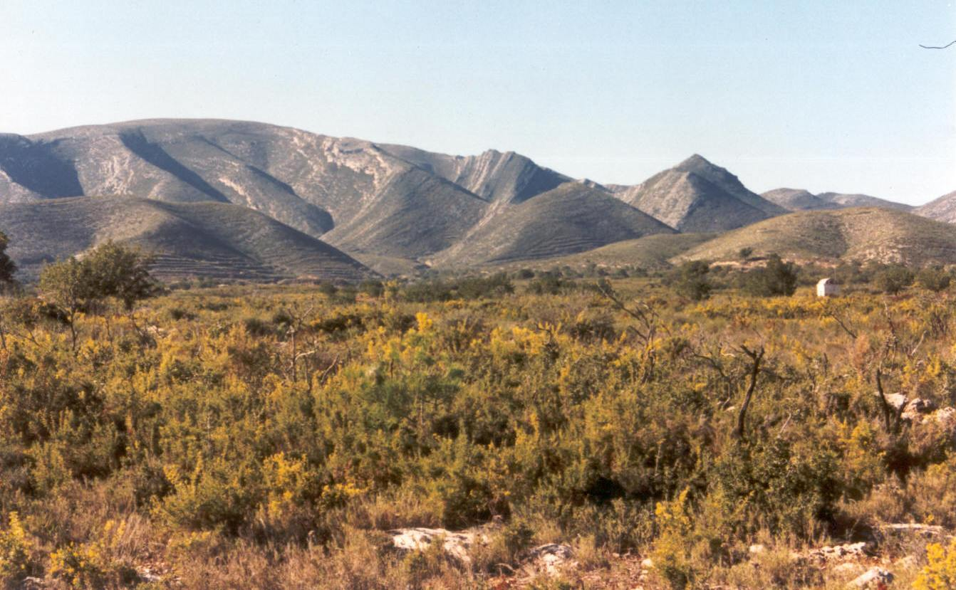 La Sierra del Caballón, en la parte más occidental del término de Catadau, provincia de Valencia.